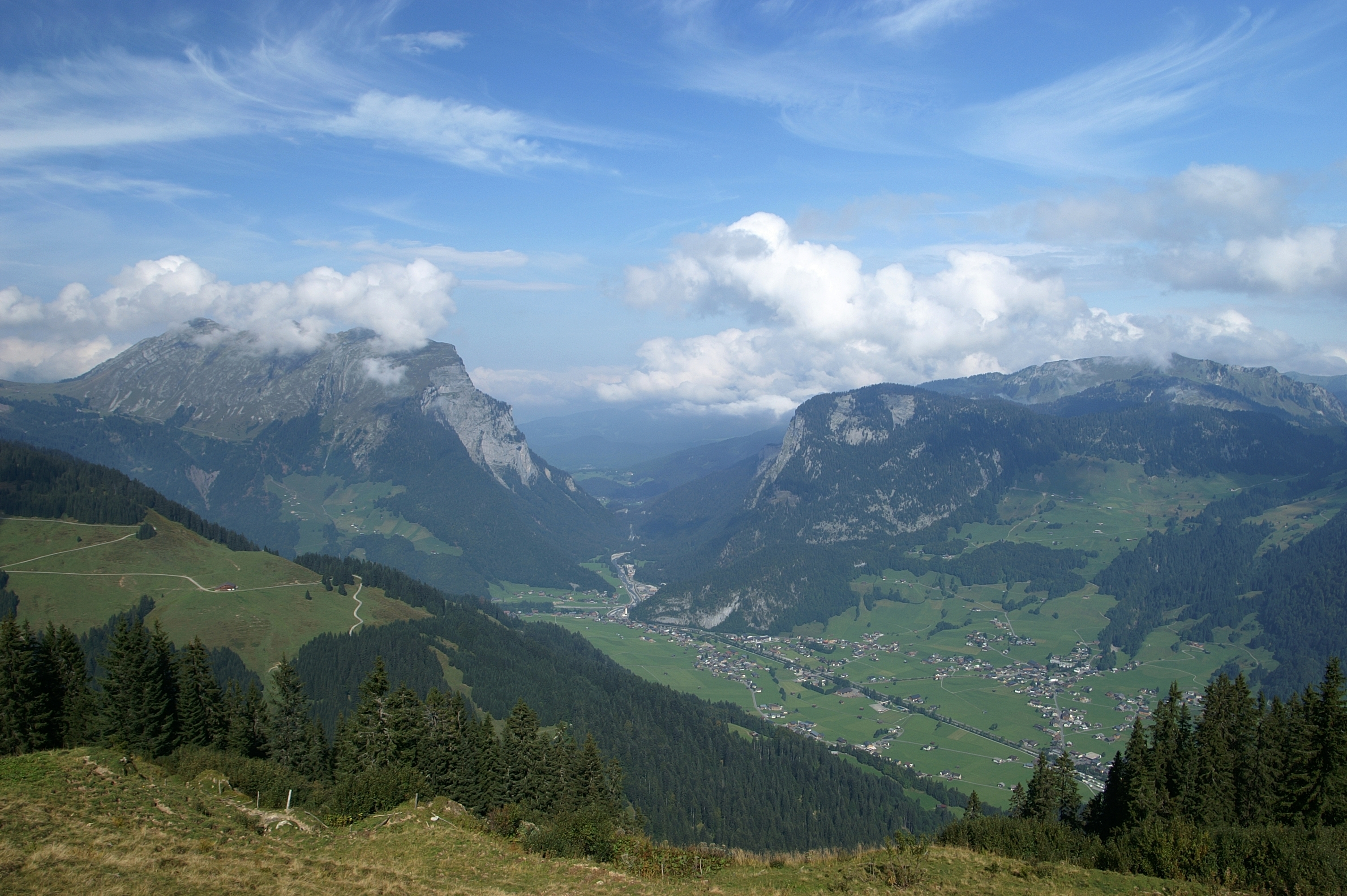 Vor dem Kalbalaloch richtet sich der Blick auf den Bergeinschnitt mit links der Kanisfluh und rechts der Auer Mittagsfluh. Am rechten Horizont liegt der Hirschberg. Im Tal das Auer Gemeindegebiet. Folgt man der Bregenzer Ache gelangt man nach Schnepfau.